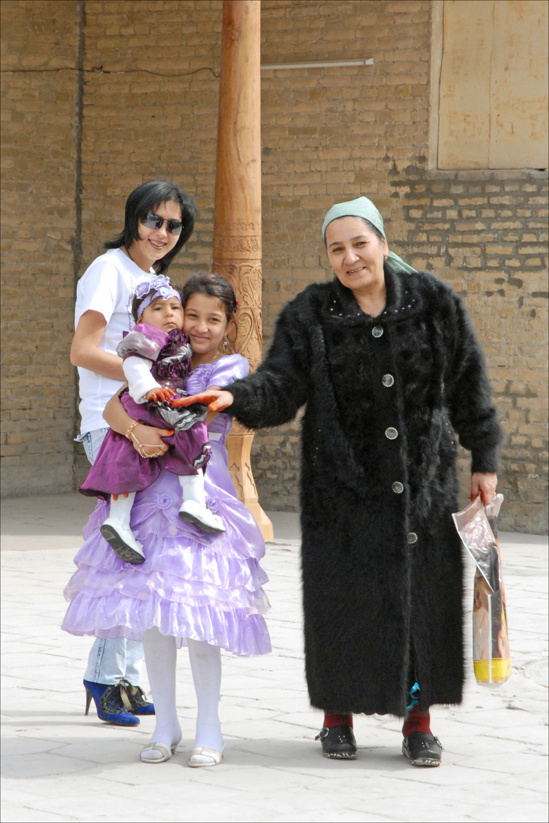 Navrouz (nouveau jour en farsi) est la fête du Printemps, elle est célébrée le 21 mars dans de nombreux pays d'Asie centrale. Interdite à l'époque soviétique, elle existait pourtant avant l'Islam et marque la nouvelle année. Les jeunes filles portent à cette occasion leurs costumes traditionnels, toujours très colorés ou leurs plus belles robes comme sur la photo où trois générations de femmes célèbrent cette fête.